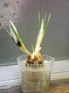 water-cultivate a crocus（クロッカスの水栽培）